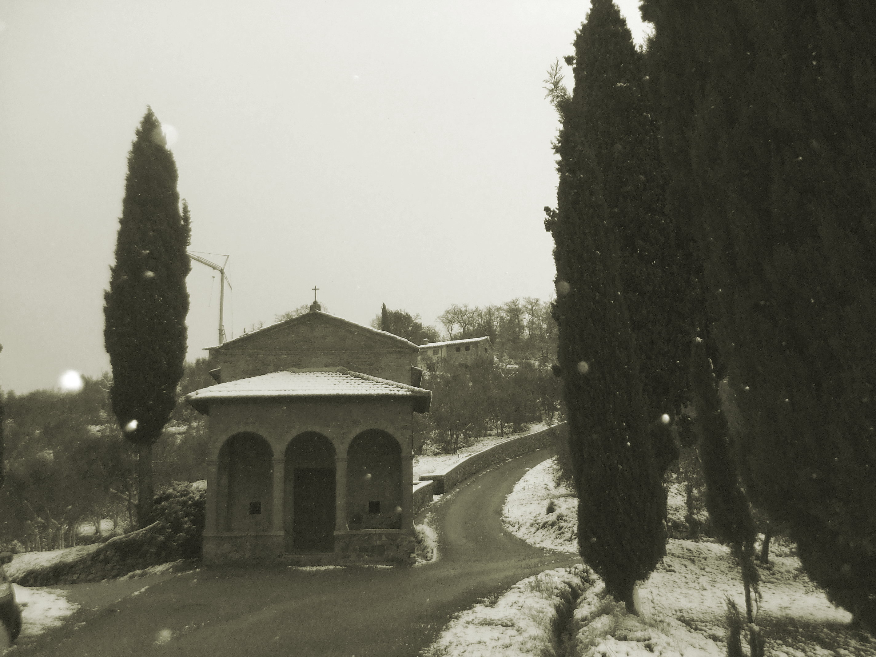 Maesta Mammi sotto la neve